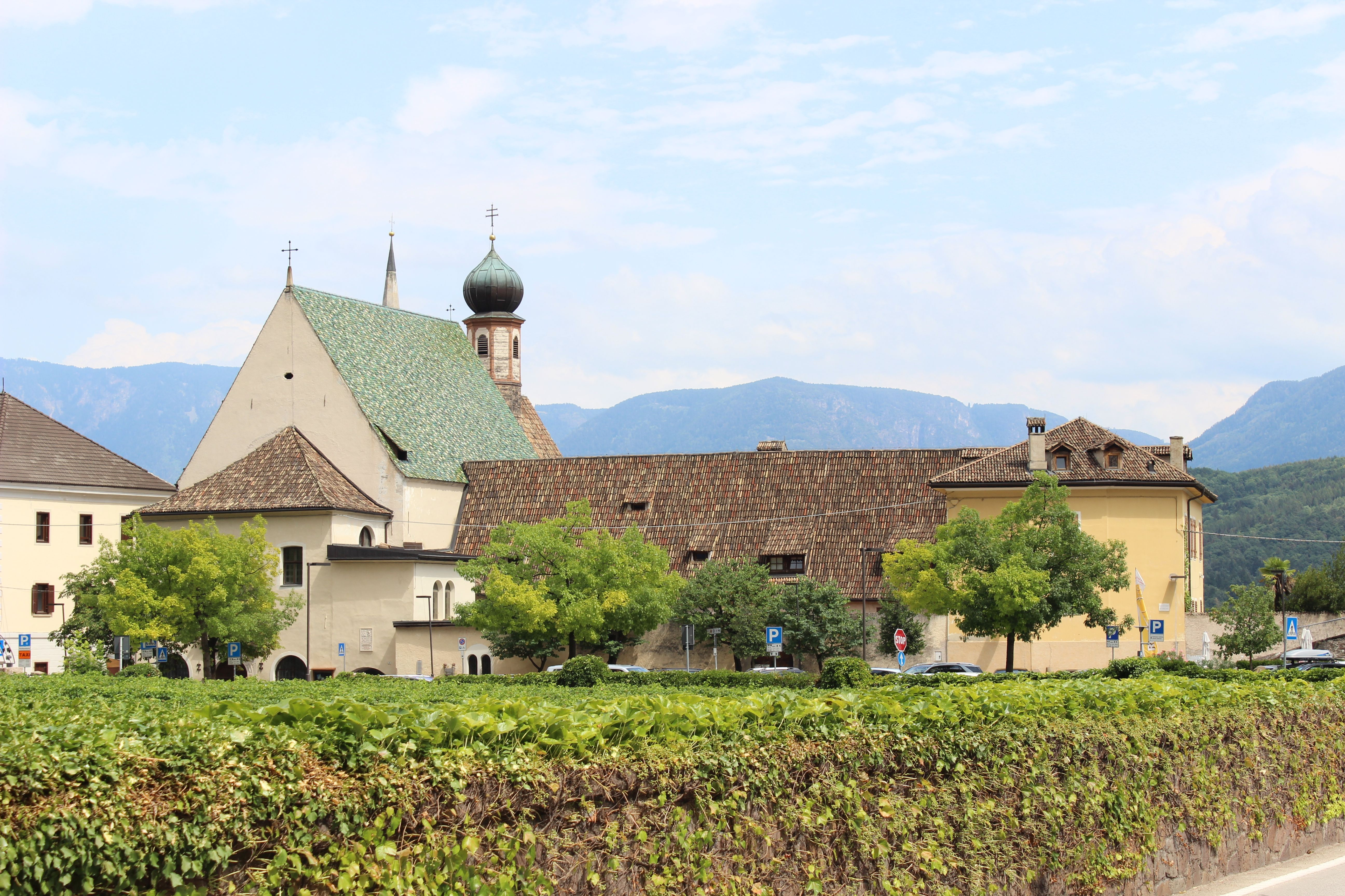 Franziskanerkloster mit Kirche St. Claudia in Kaltern